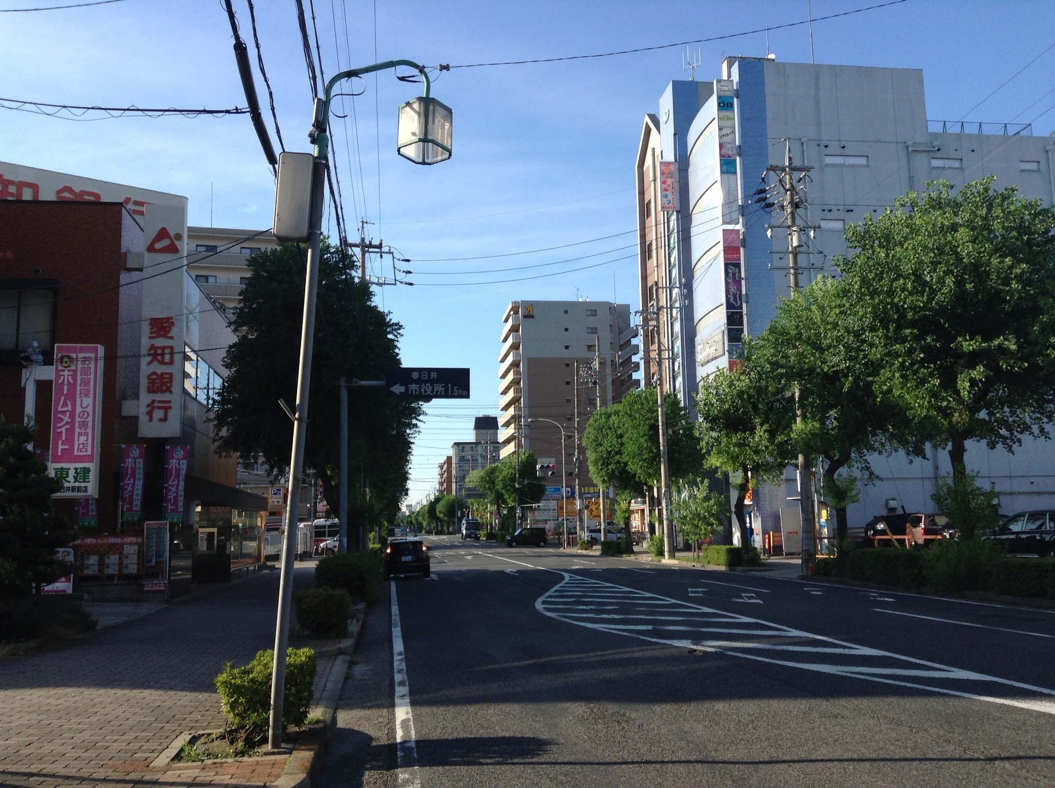 愛知県春日井市中央通